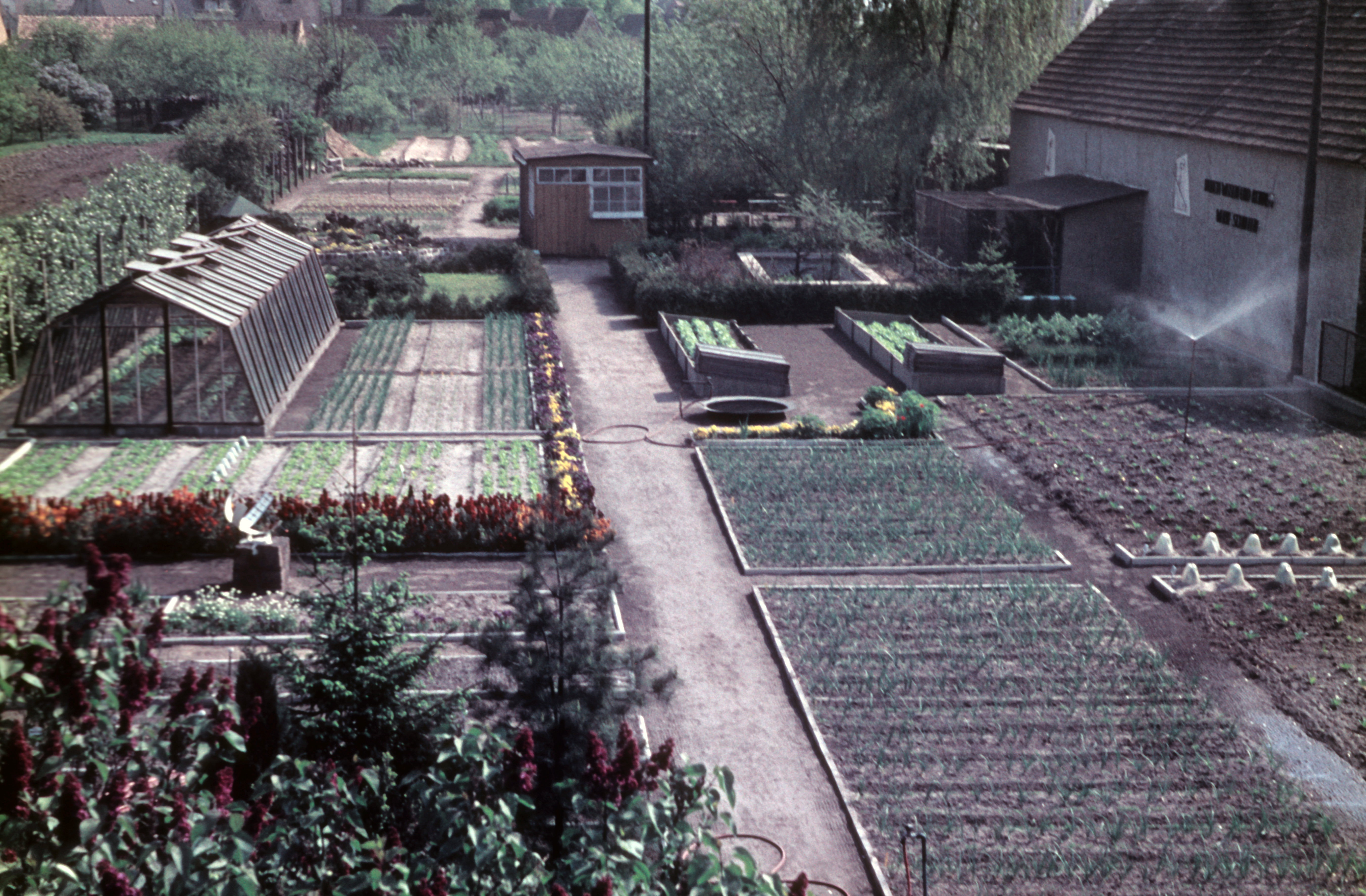 Ruhland, Hartwigstraße, Schulgarten, Westansicht